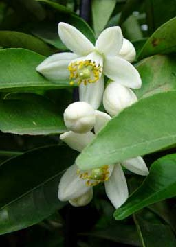 橘の花